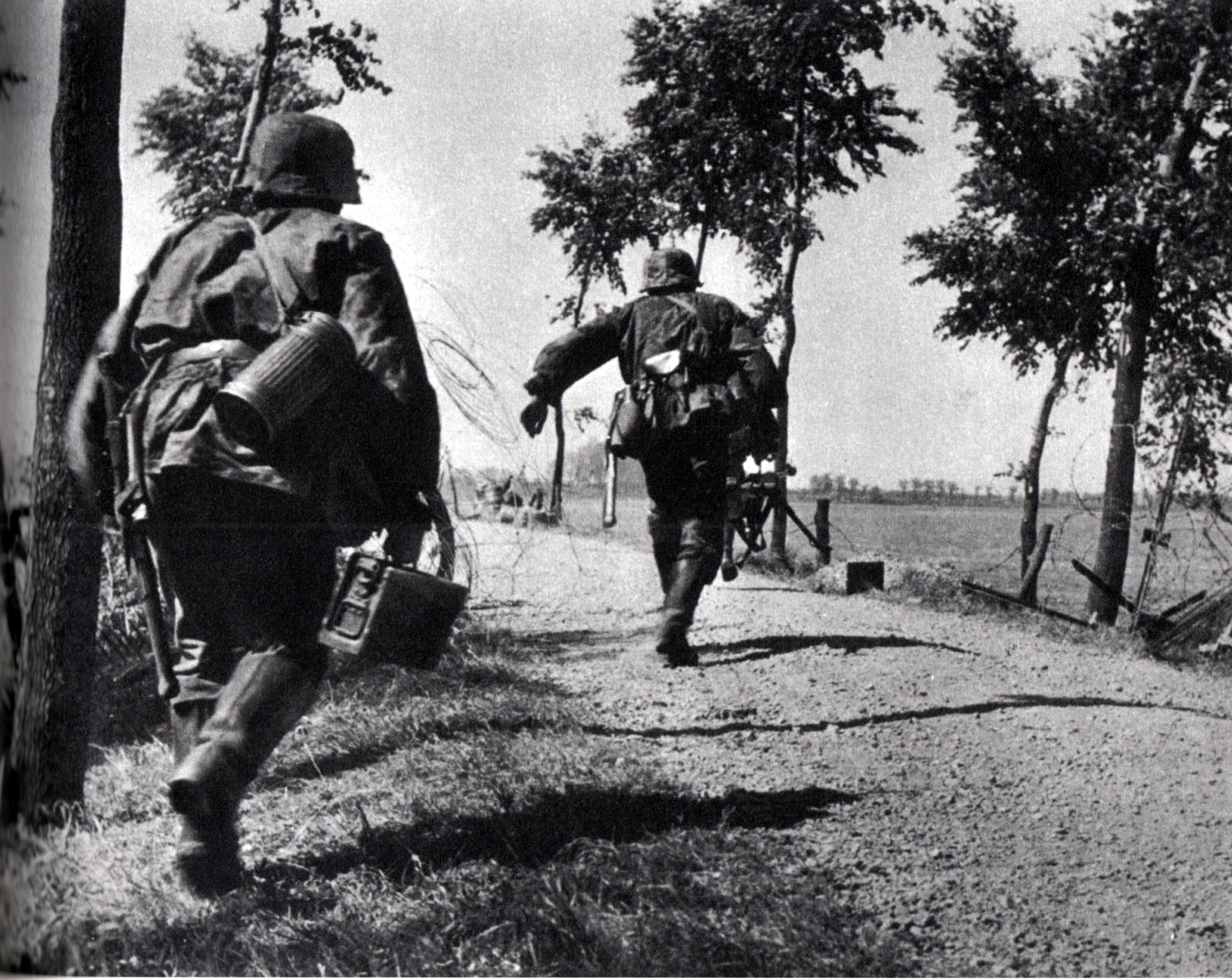 De strijd in Zeeland. Een Duitse mitrailleurploeg bij de prikkeldraadversperring van de Zanddijkstelling